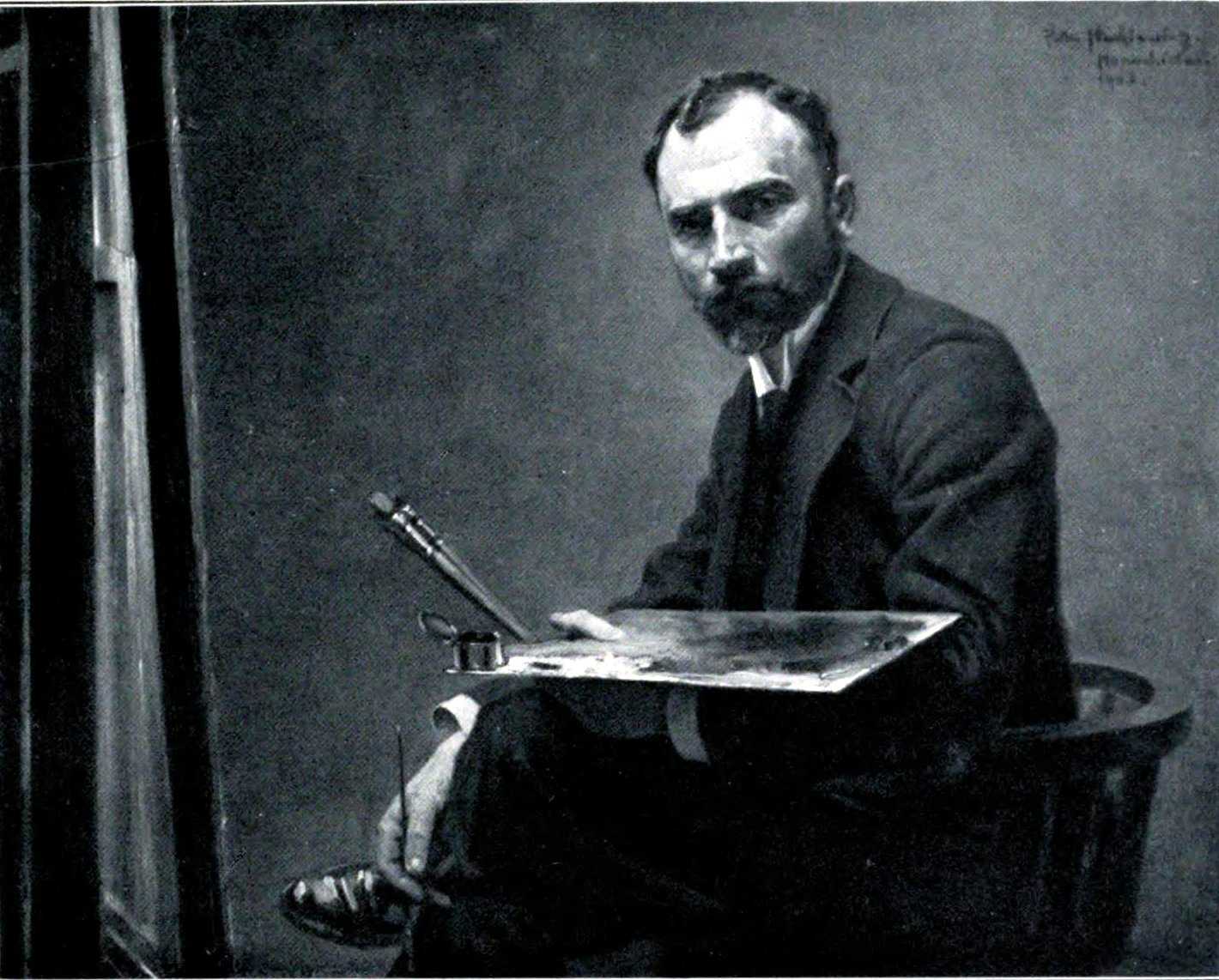 Self-portrait